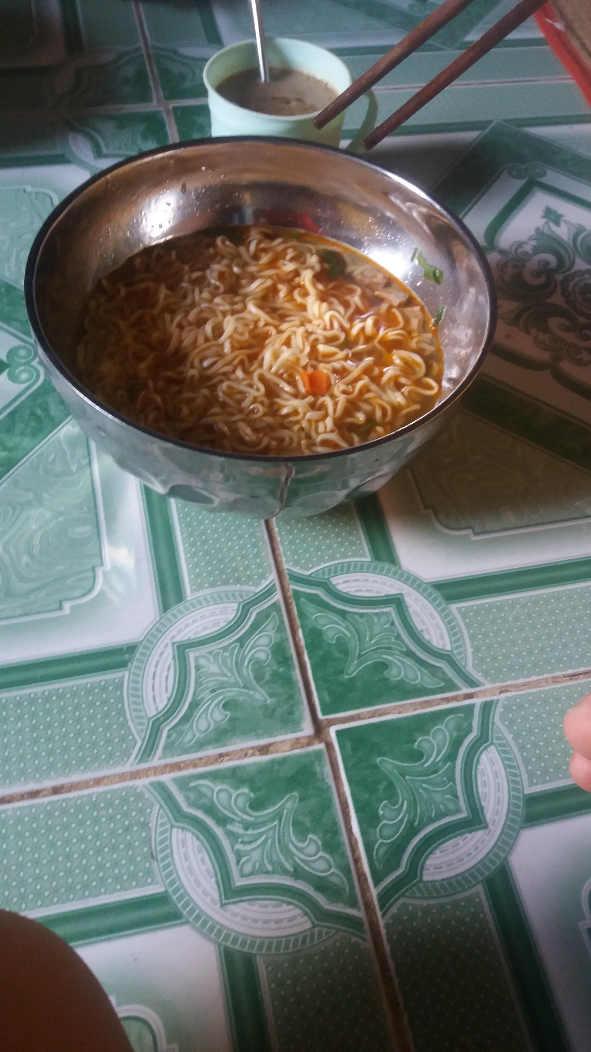 Một bát mì gói omachi